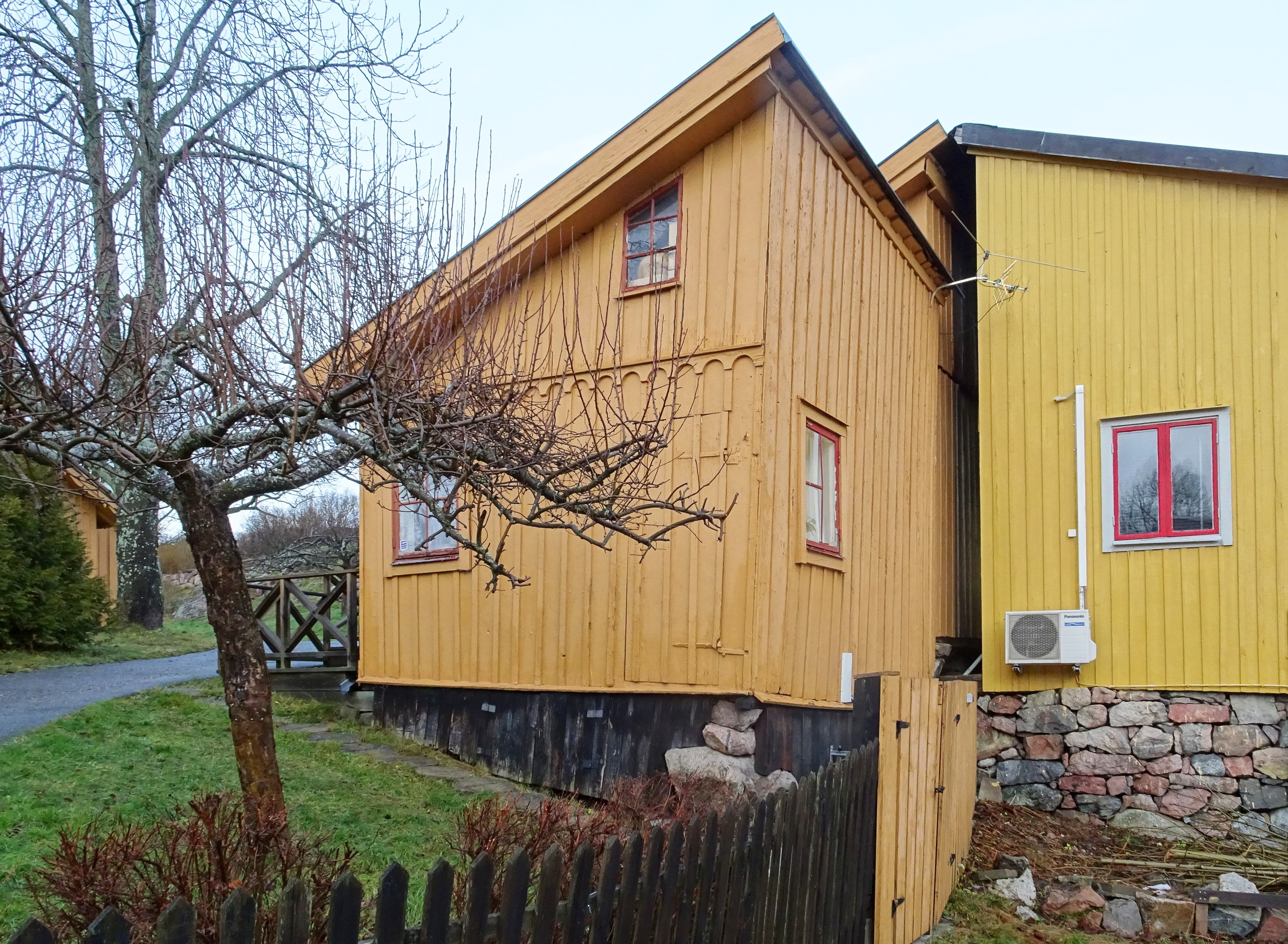 Svanteberg, Drottningholmsmalmen, Dragonvägen 22 (uthuslängan)